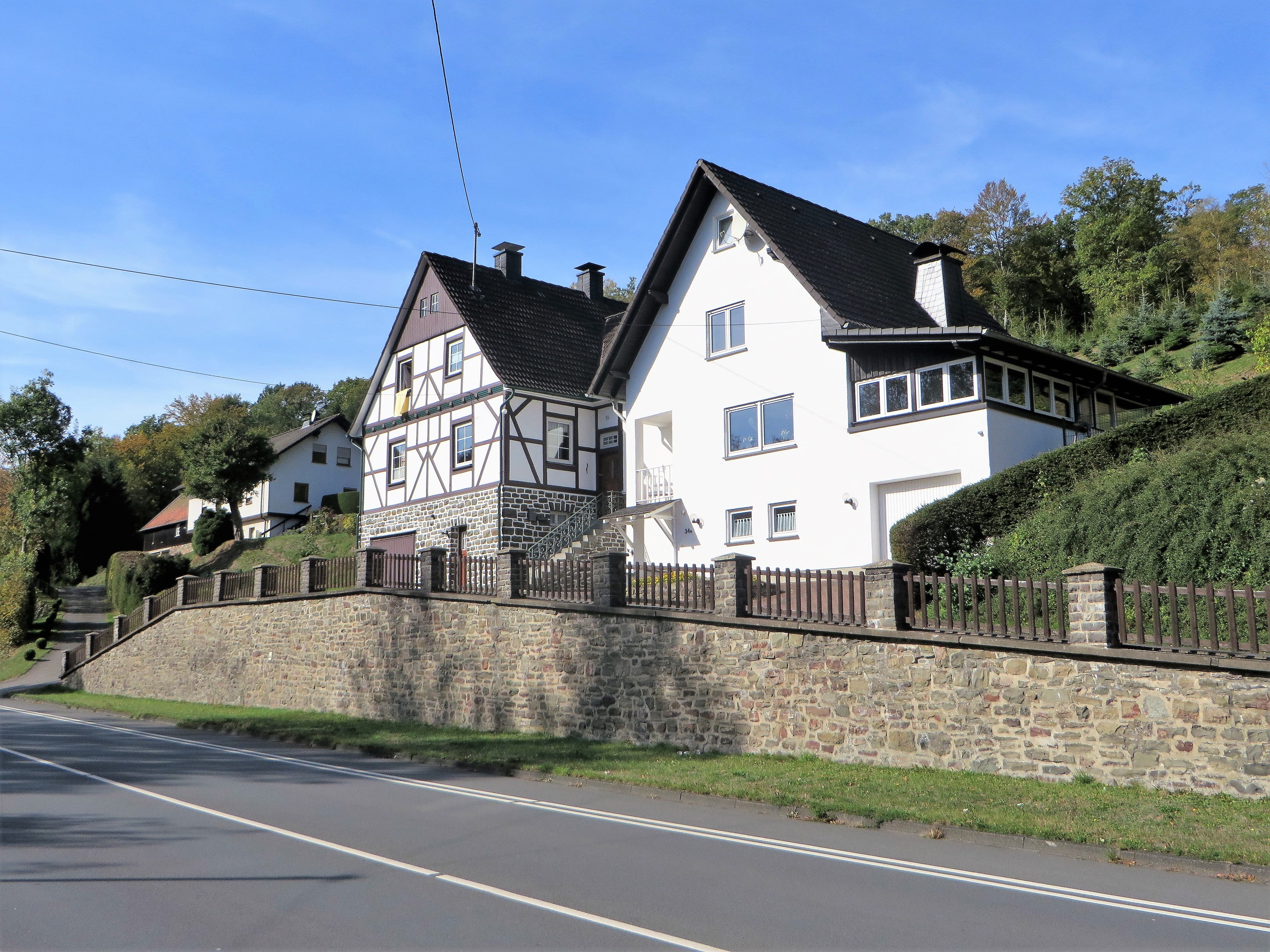 Wohnhäuser an der Ihnestraße im Attendorner Ortsteil Kraghammer.